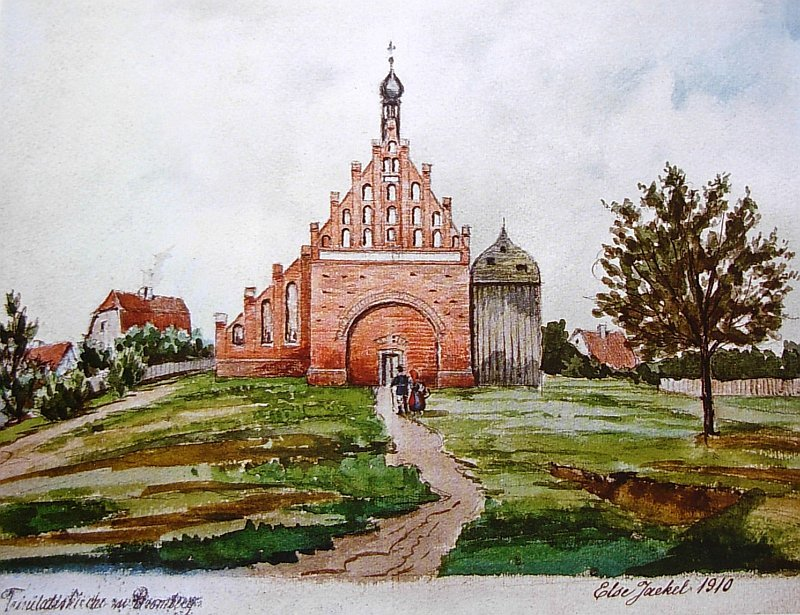 Stary kościół Świętej Trójcy w Bydgoszczy (1550-1828)